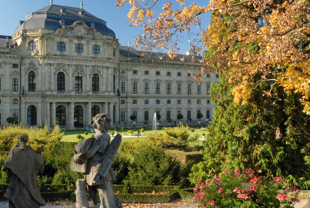 Würzburg, Hofgarten - Residenz